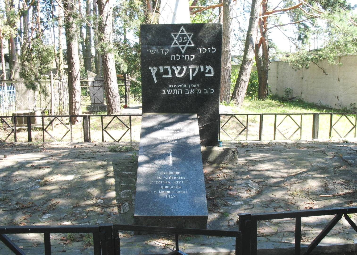 Памятник на братской могиле евреев Микашевичей, убитых нацистами и полицаями 6 августа 1942 года. Возведен в 1992 году.